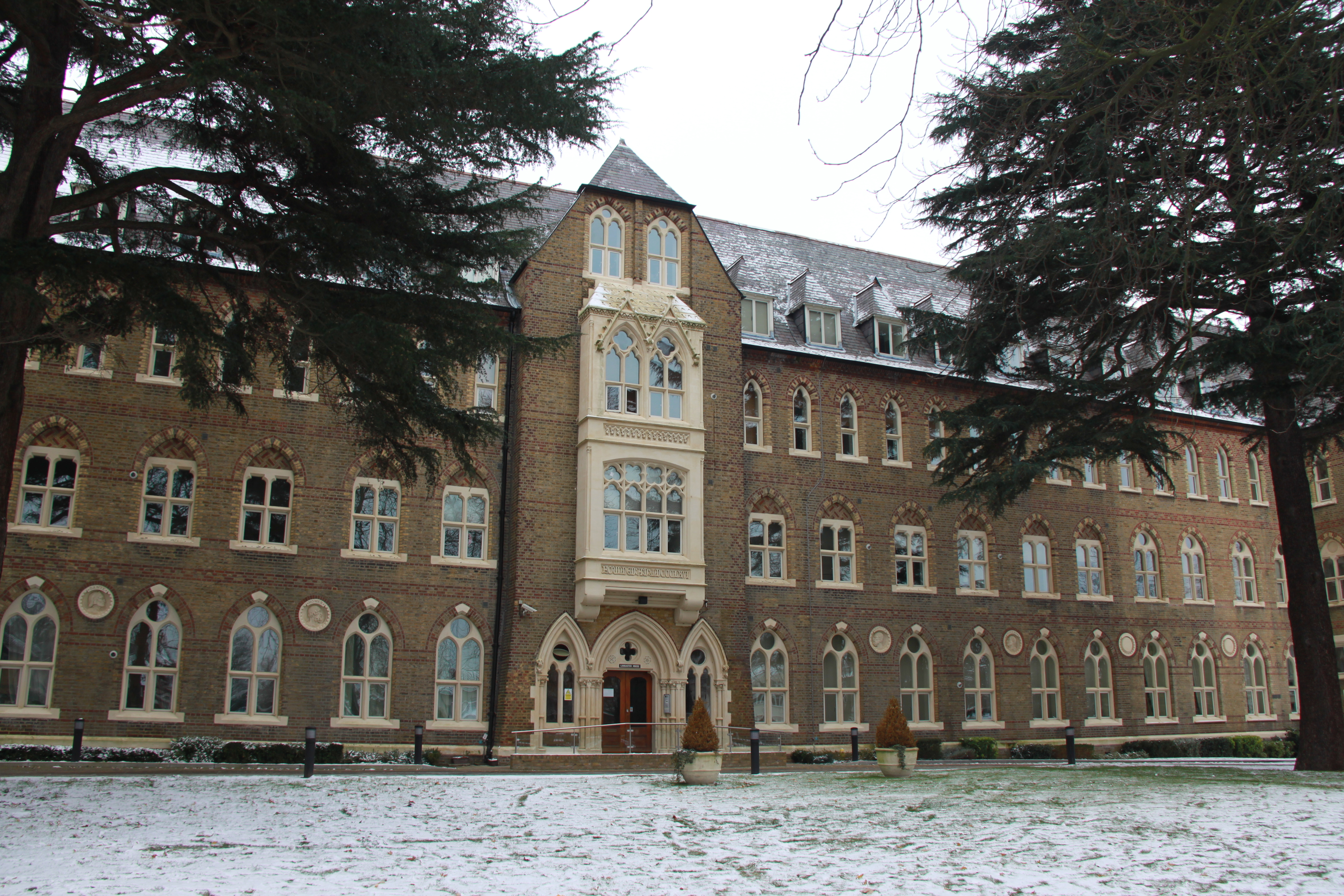 December 2010